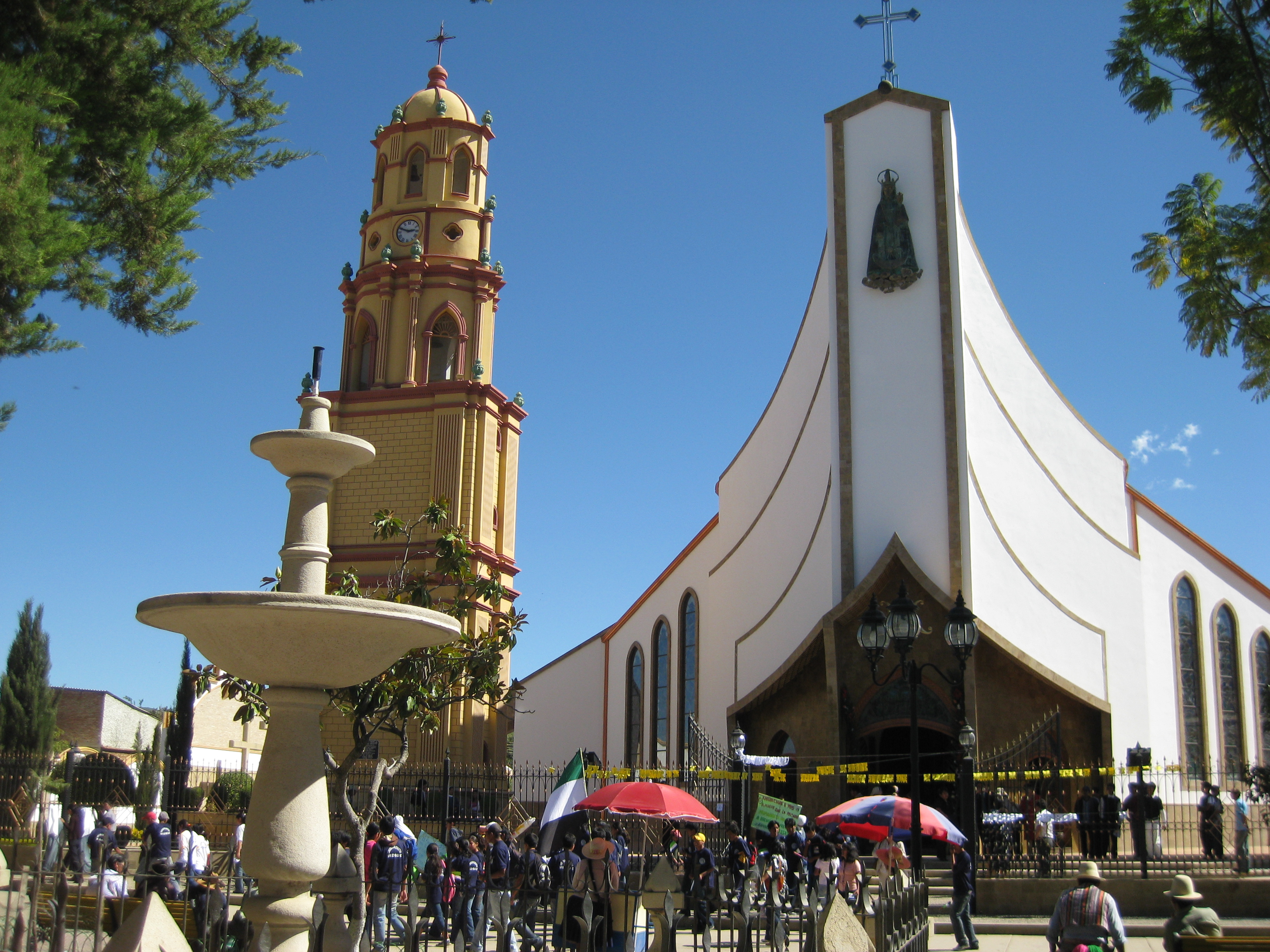 Catedral de San Pedro Virgen de la Candelaria.